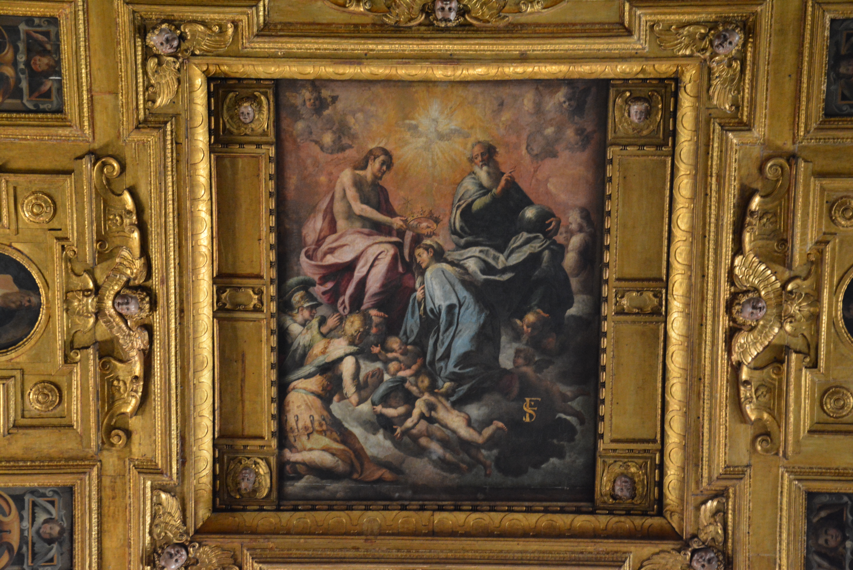 Soffitto della chiesa di Santa Maria la Nova a Napoli